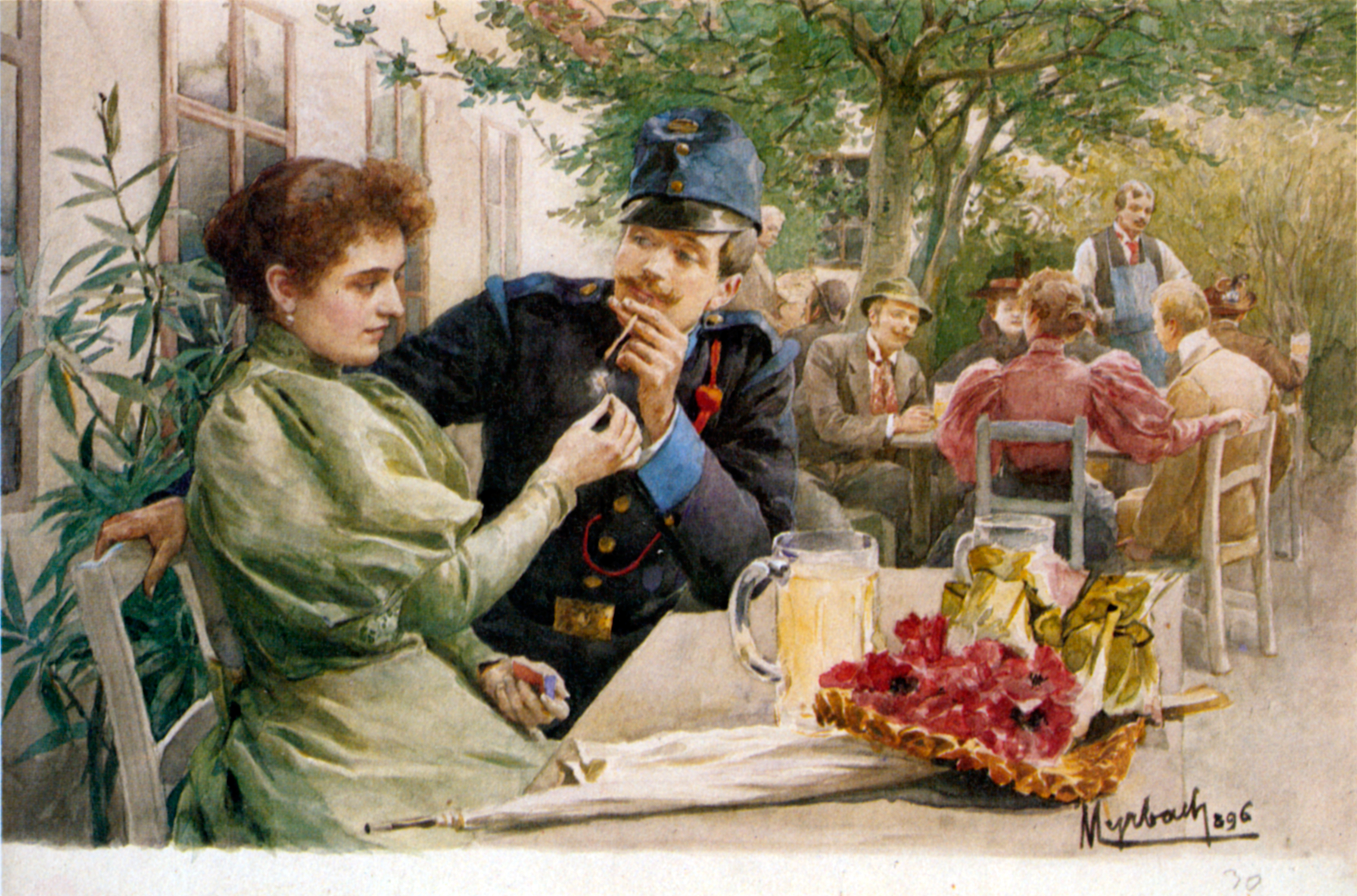 Im Wirtshausgarten